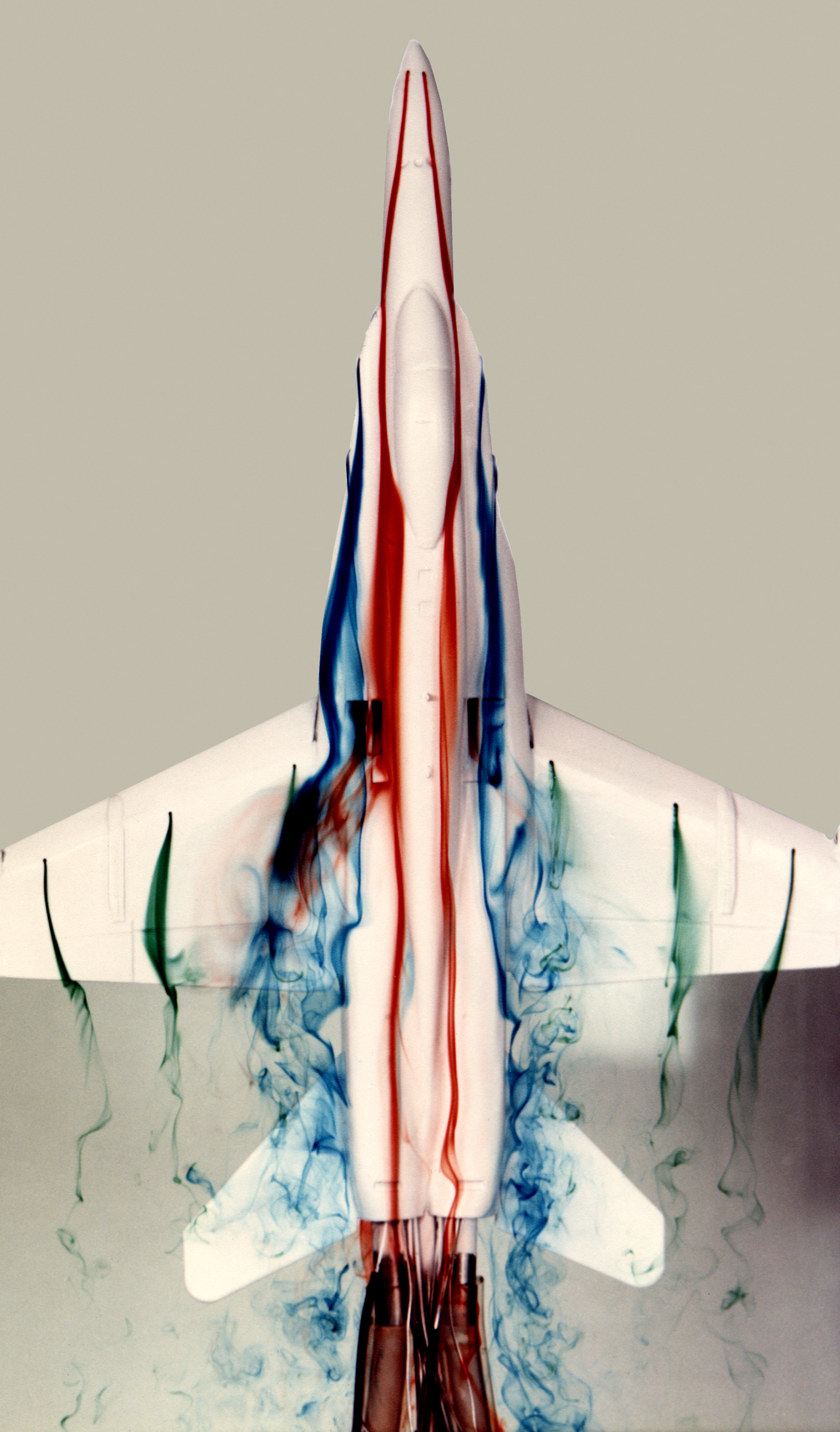 Ein Modell einer F-18 in einem Wassertunnel.